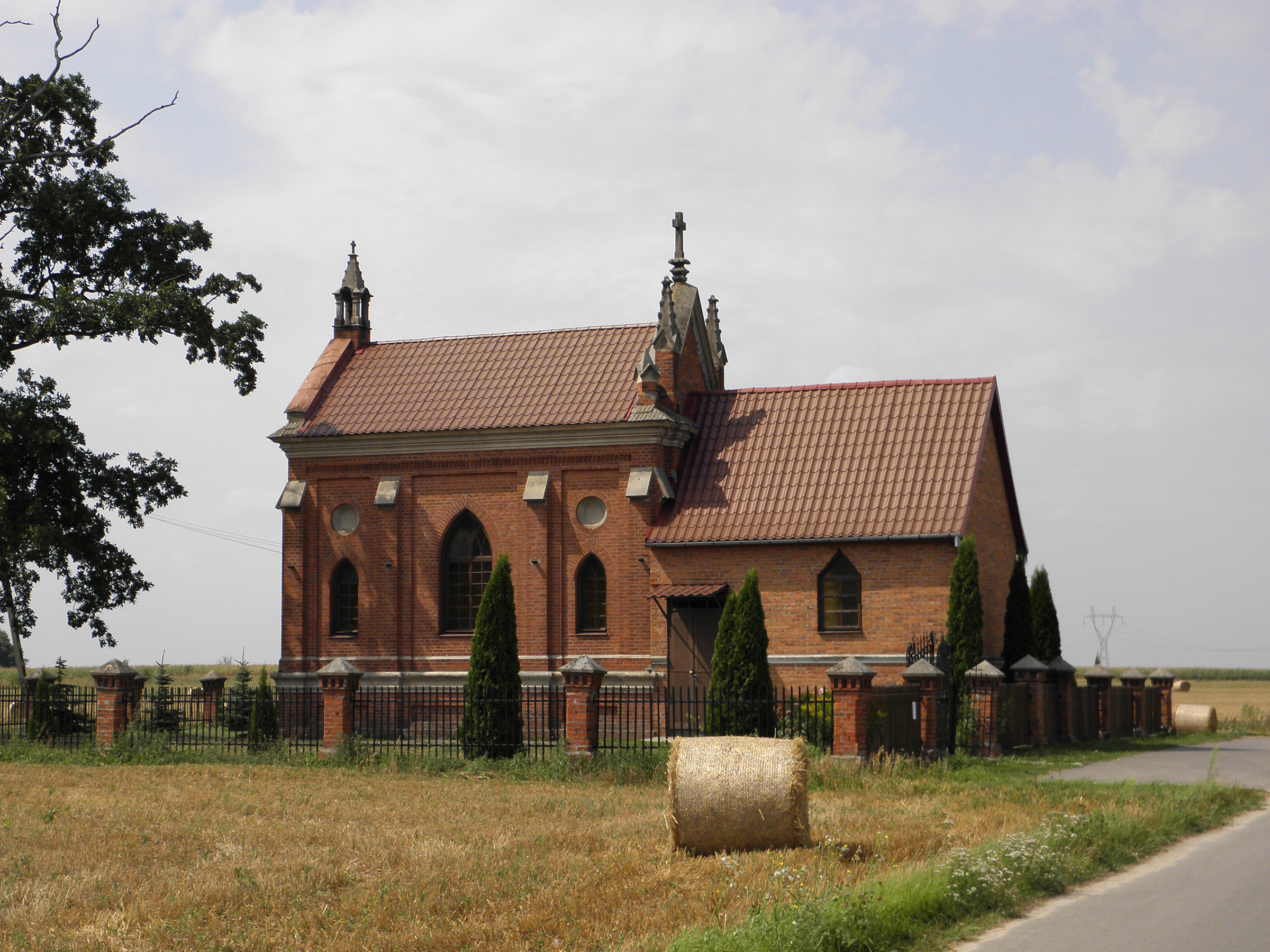 Grabów Nad Wisłą - kaplica św.Zofii.